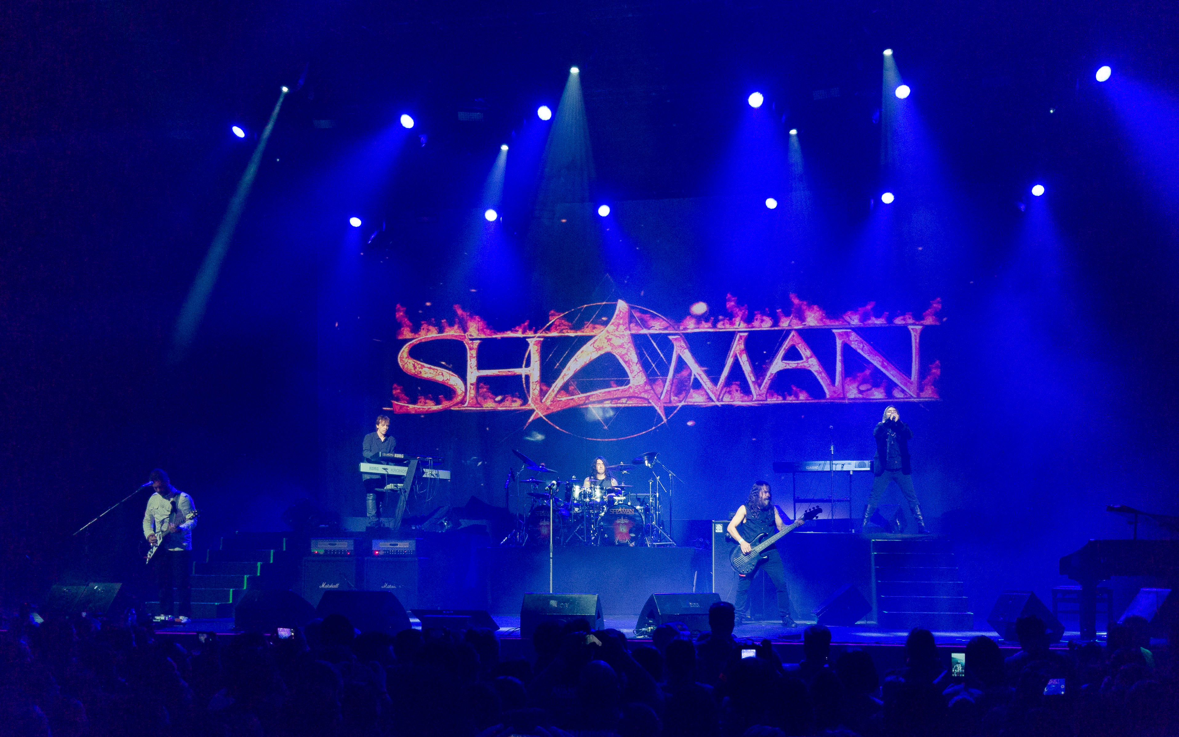 Último show André Matos do Shaman